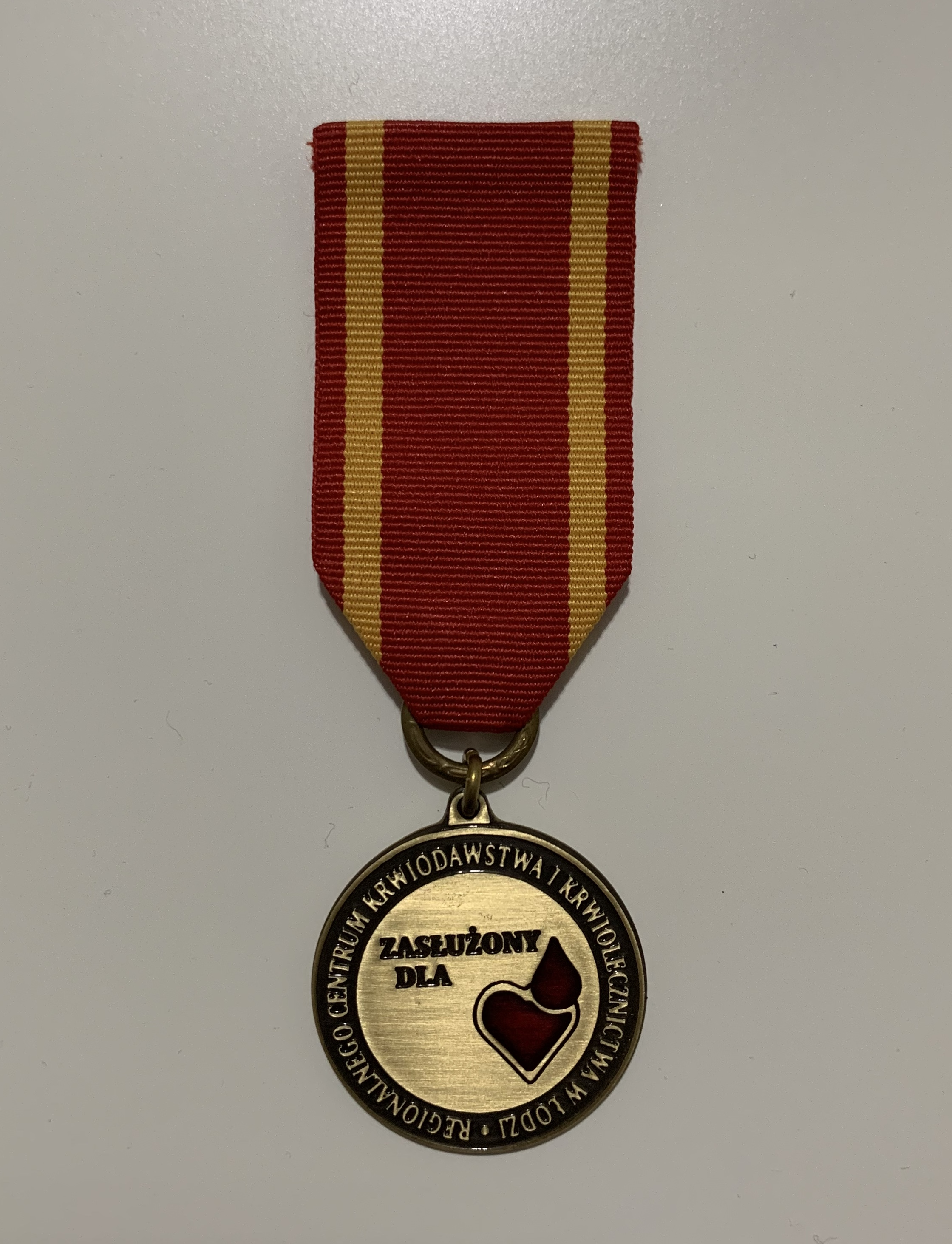 Awers